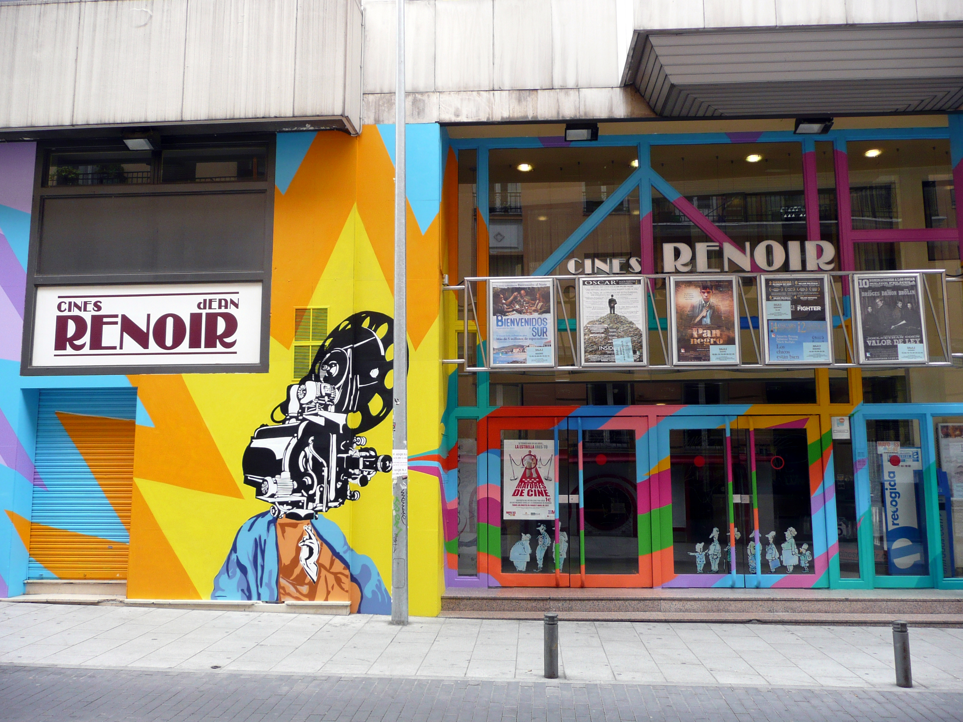 Renoir Plaza de España en la calle Martín de los Heros.